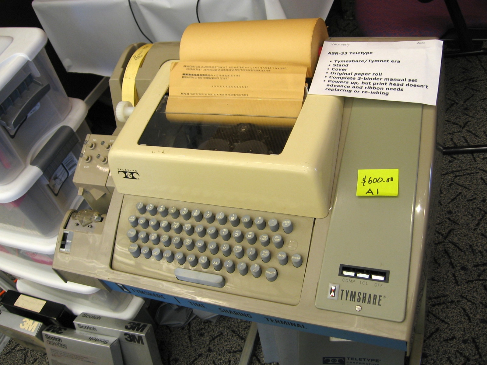 ASR-33 teletype